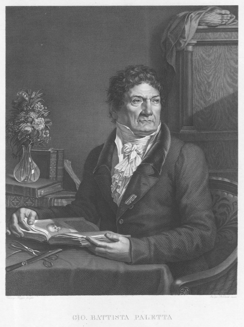 Kupferstich Portrait, Giovanni Battista Palletta mit Anatomielehrbuch